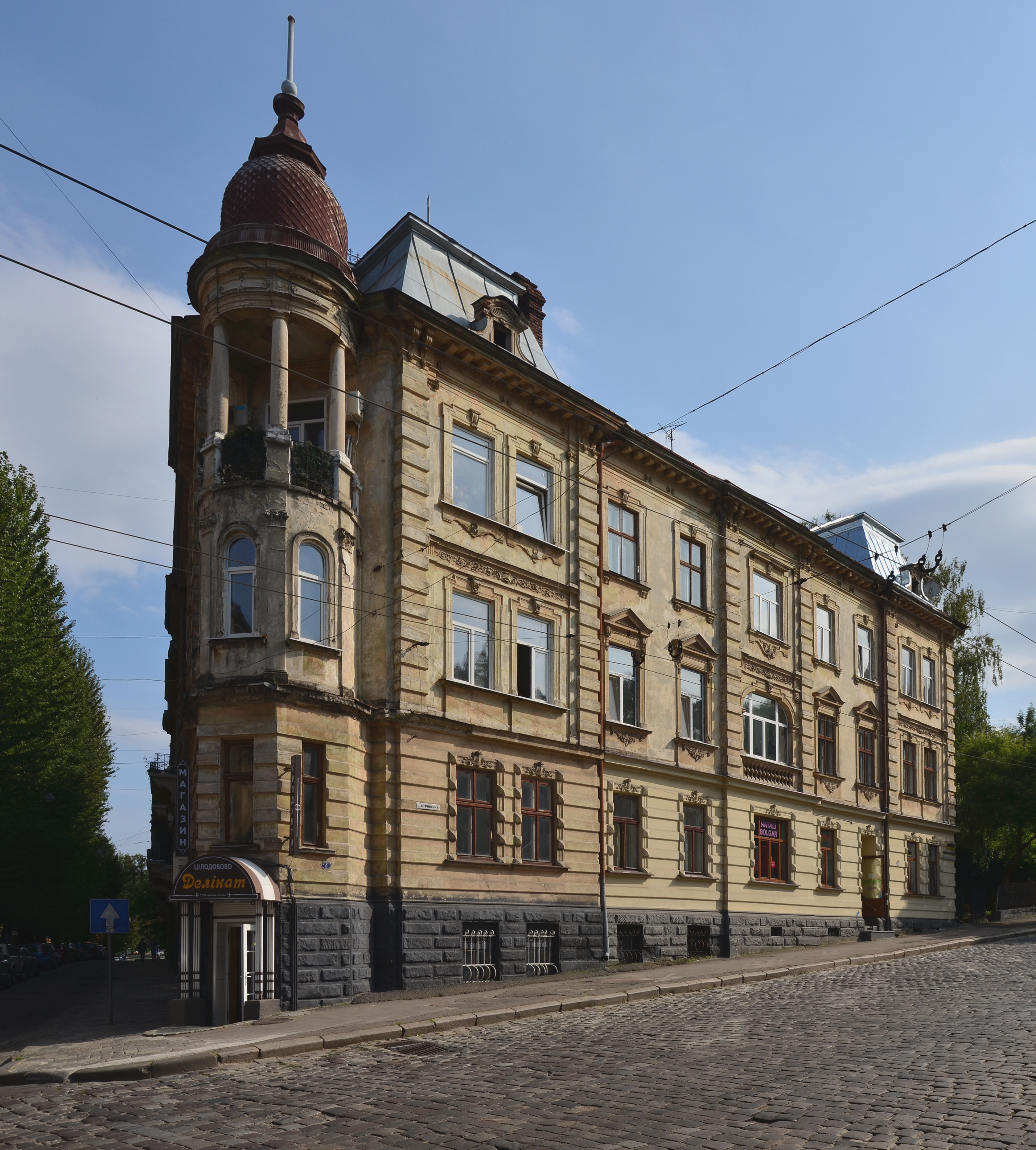 Будинок № 5 на вулиці Стрийській у Львові.